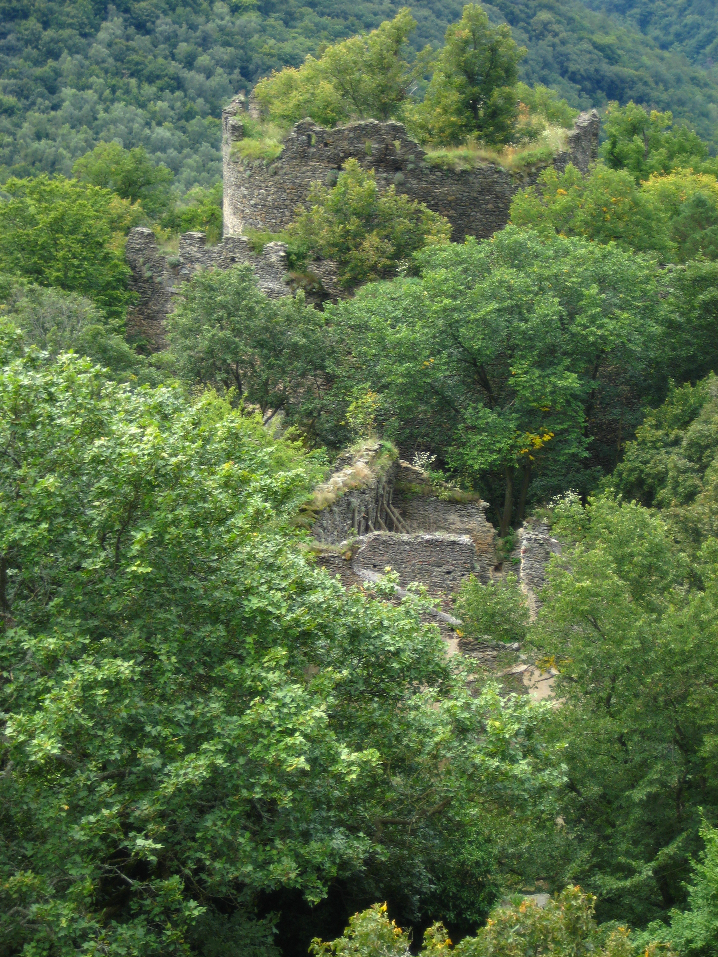 Hrad Nový Hrádek, zřícenina (Lukov), Lukov